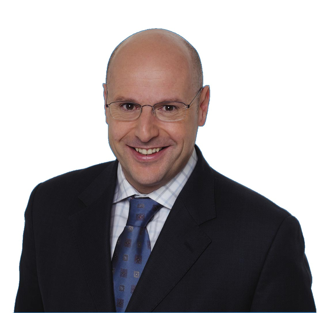 Francesc Ricomà